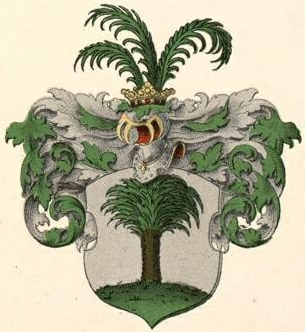 Keyserlingki suguvõsa parunivapp (Kuramaa)